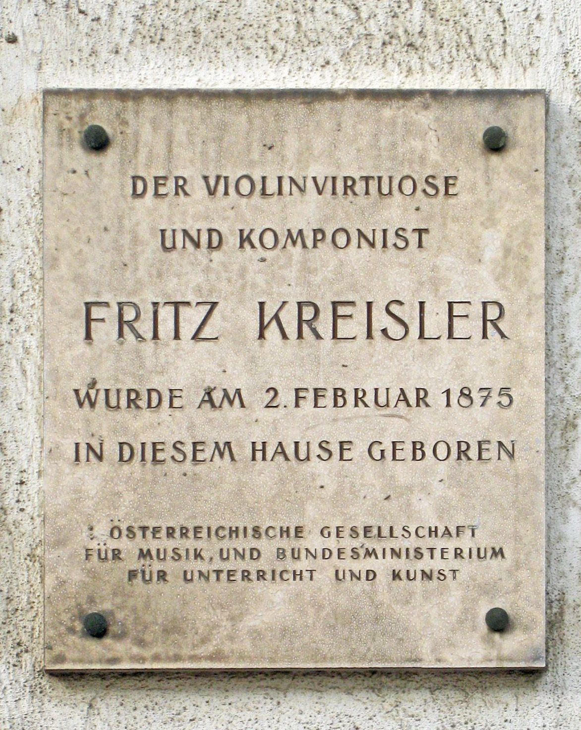 Gedenktafel für Fritz Kreisler am Haus Große Schiffgasse 21